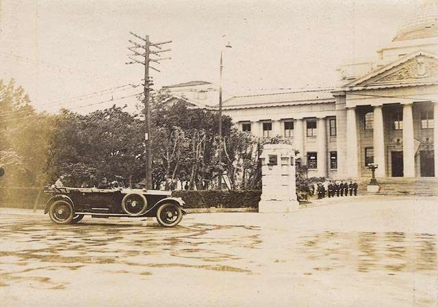 中文（台灣）: 日本裕仁太子乘車前往台北博物館（全稱為臺灣總督府民政部殖產局附屬紀念博物館）巡視